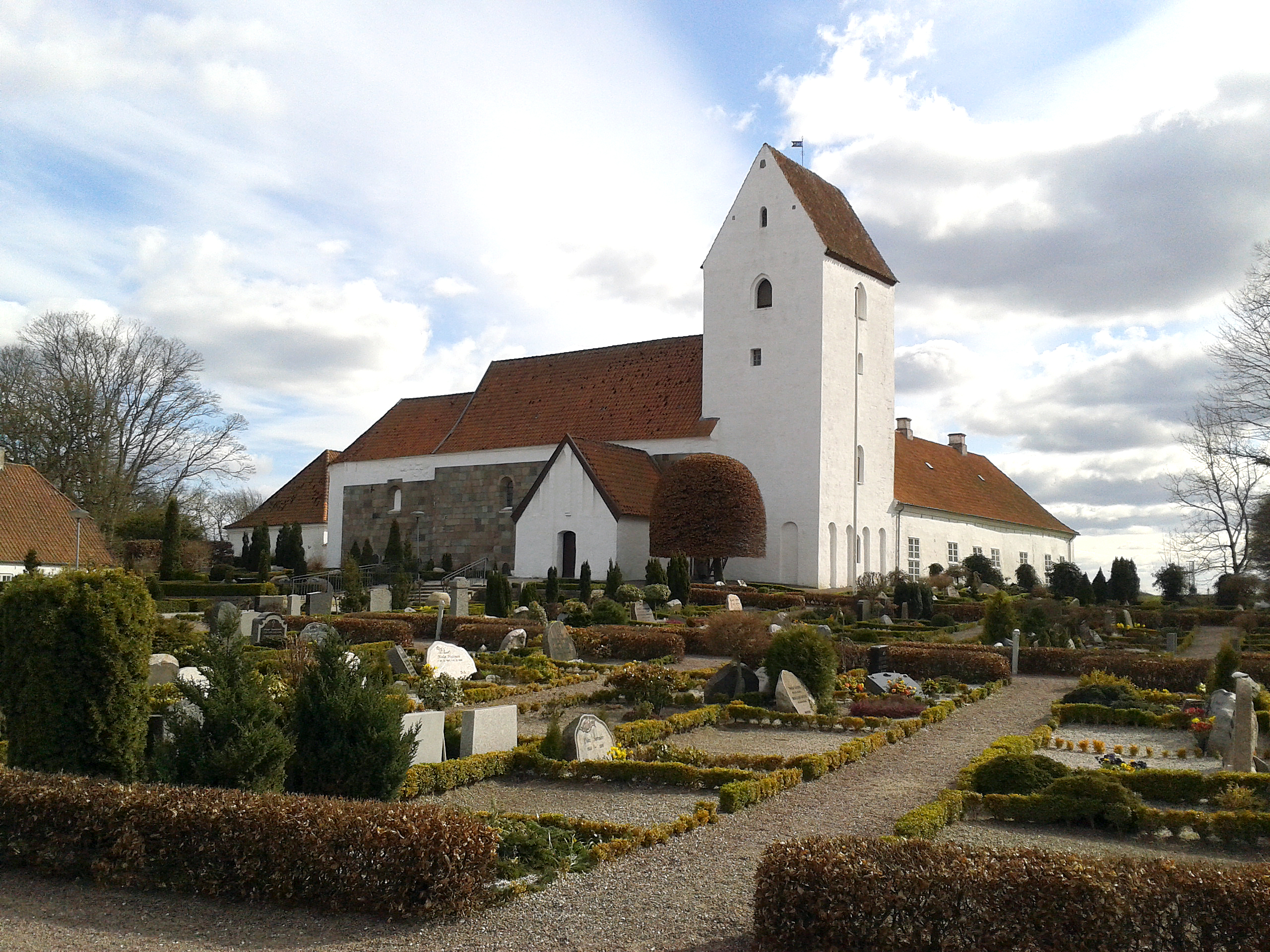 Ørslev Kirke og Kloster set fra nordvest